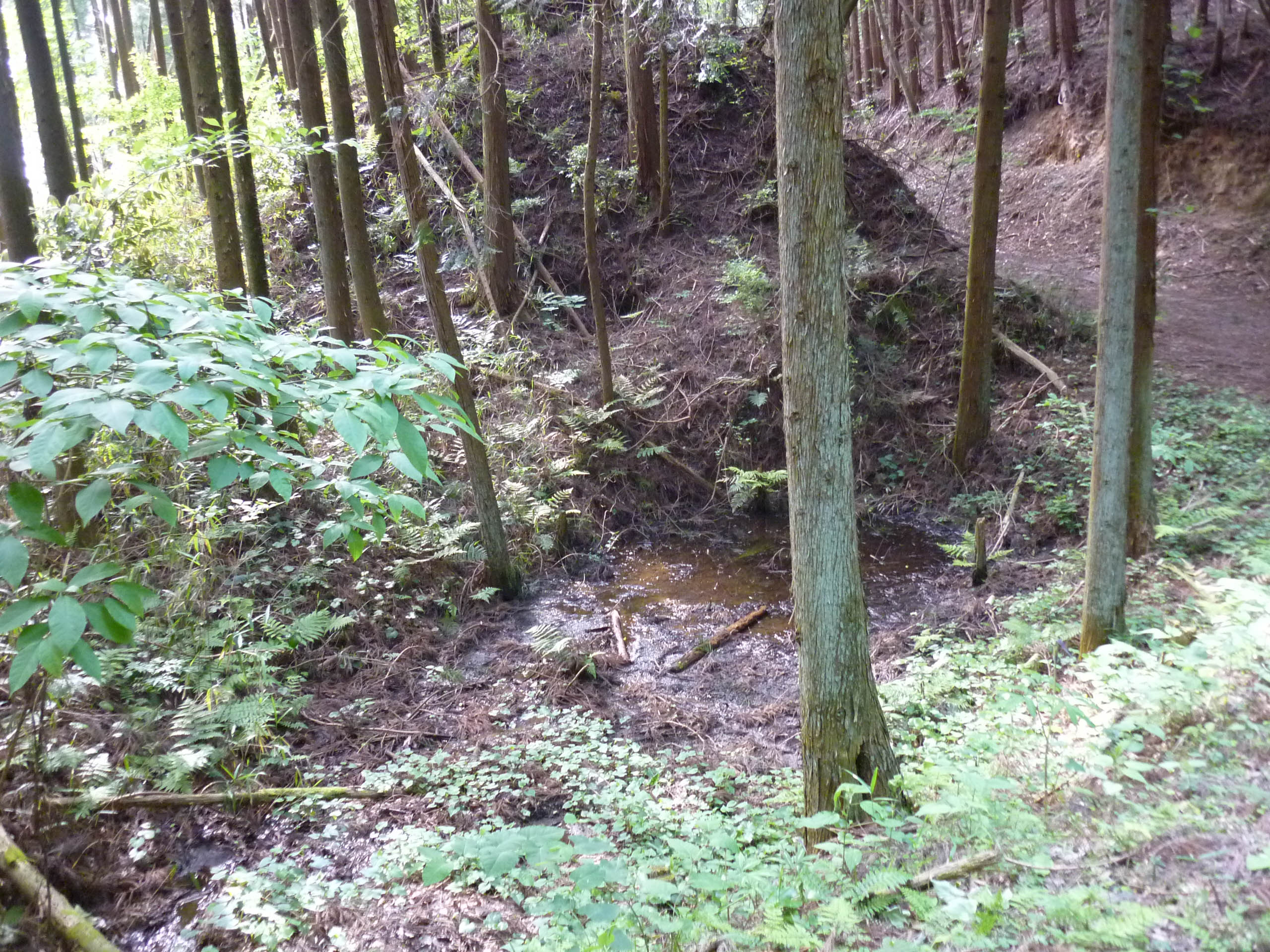 馬池